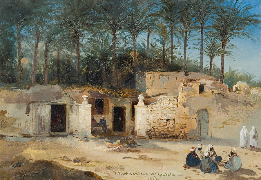 Z podróży do Egiptu (Aleksandrya 19 grudnia 1852)